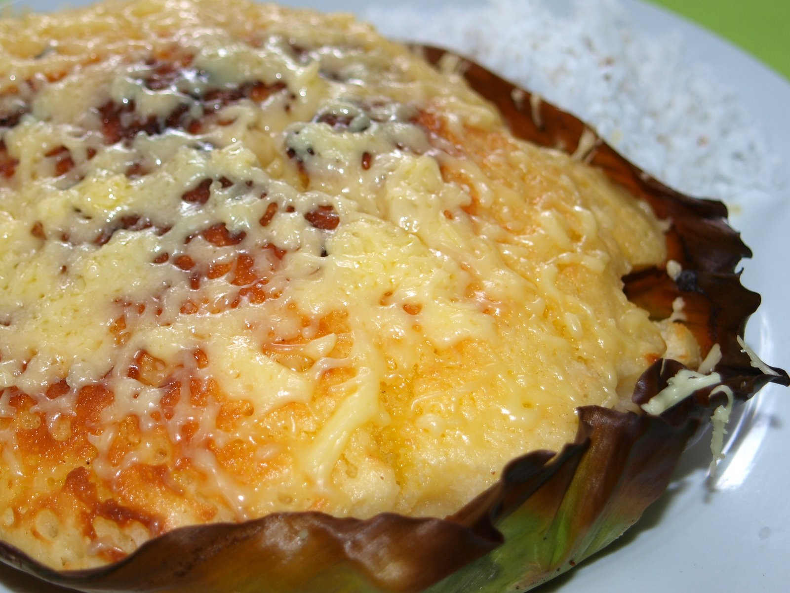 Bibingka